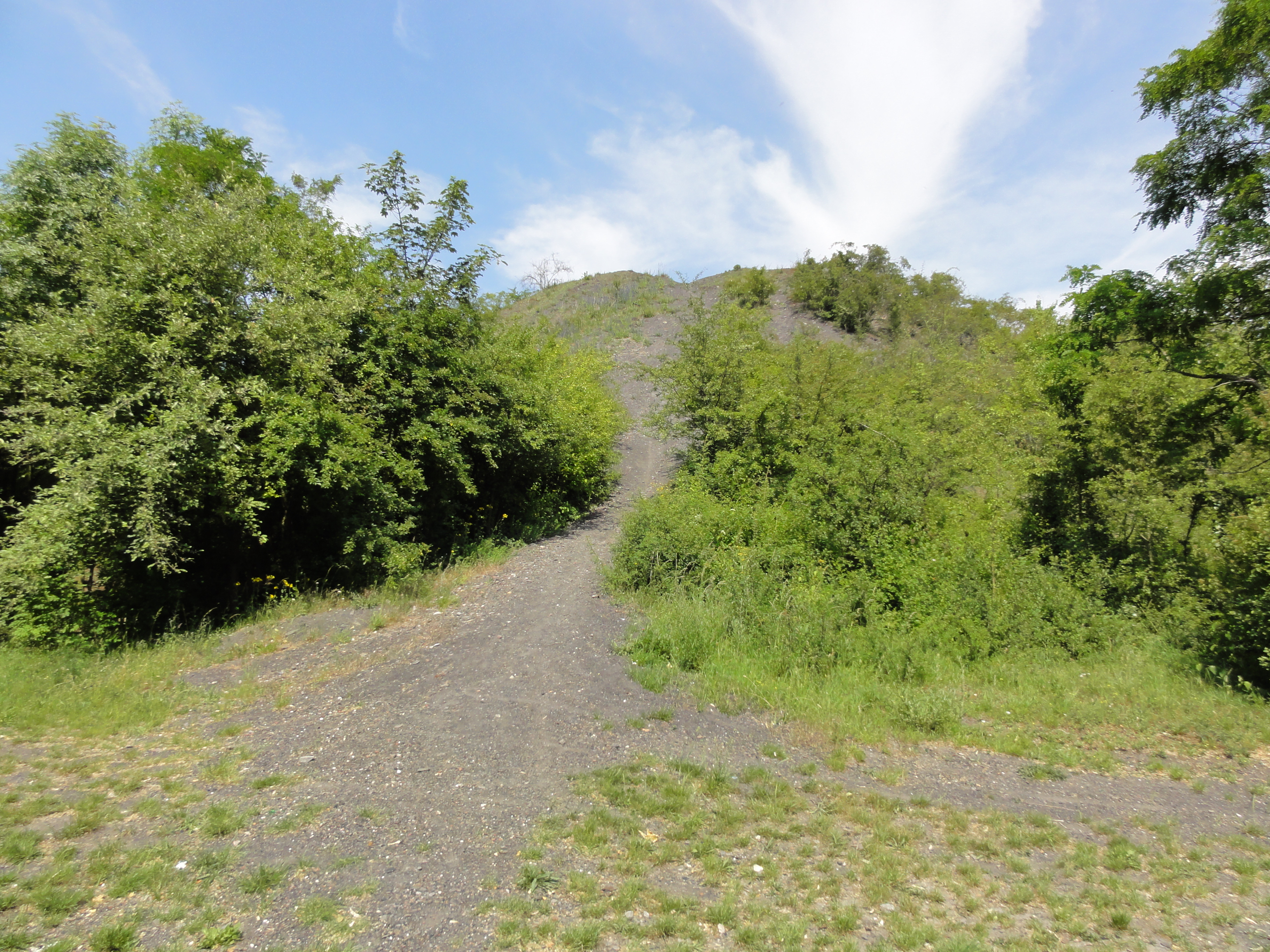 Terril n° 71 dit 2 de Liévin, fosse n° 2 de la Compagnie des mines de Liévin dans le bassin minier du Nord-Pas-de-Calais, Liévin, Pas-de-Calais, Nord-Pas-de-Calais, France.